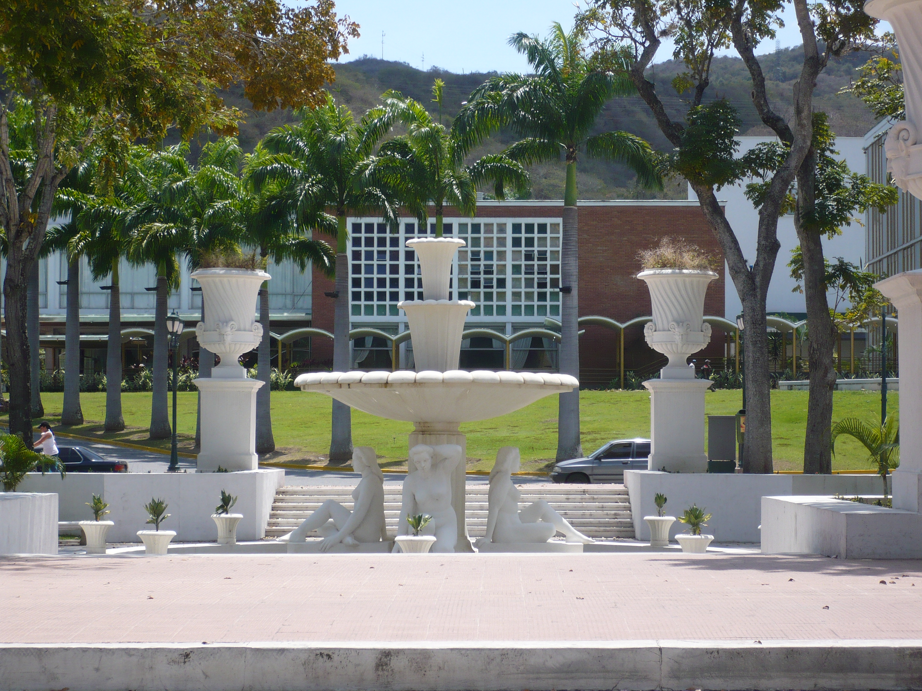 Círculo Militar en los Próceres, Caracas, Venezuela.